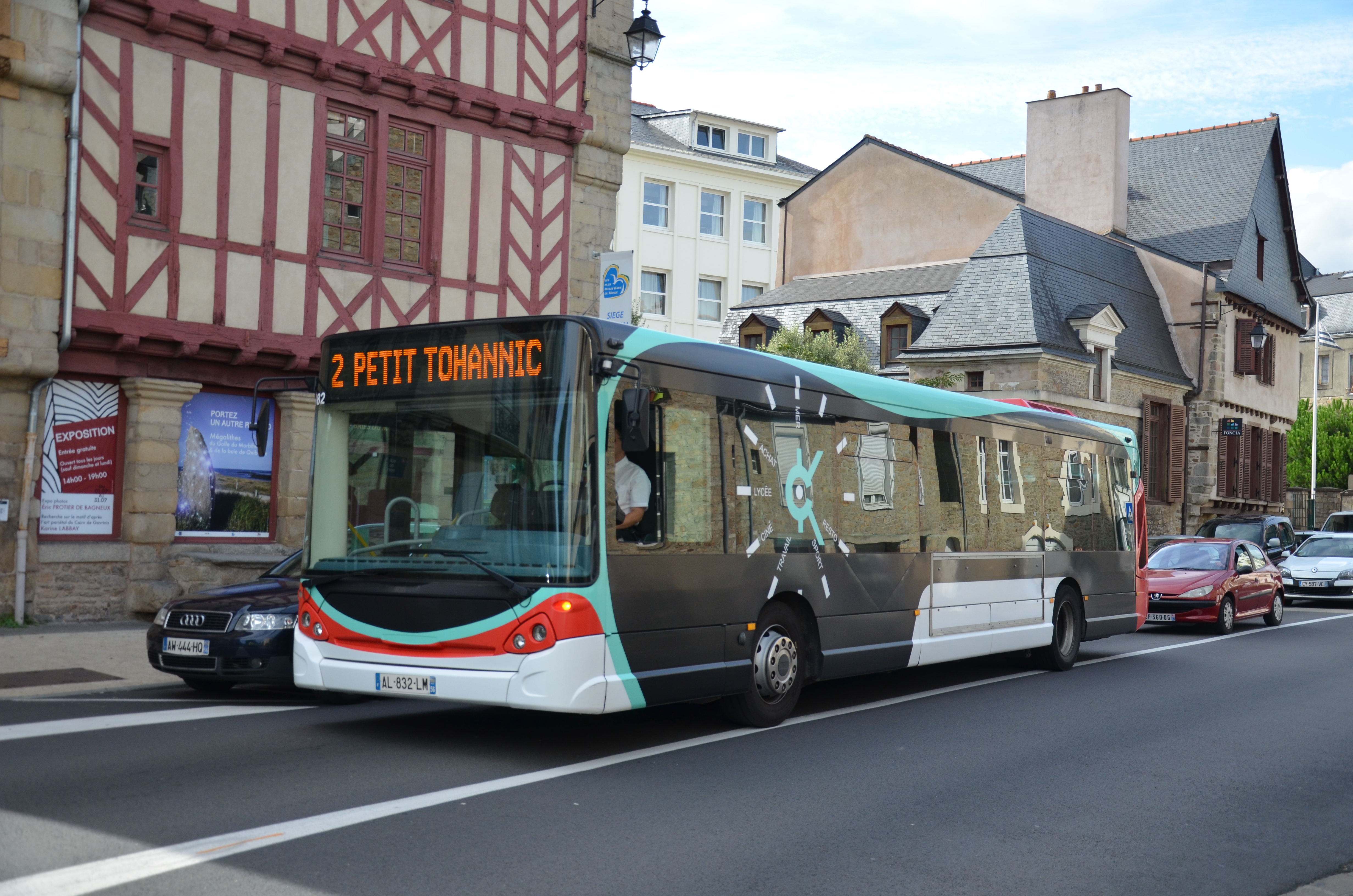 Heuliez GX 327 n°182 sur la ligne 2 du réseau KICEO, près de l'arrêt Hôtel de Ville.